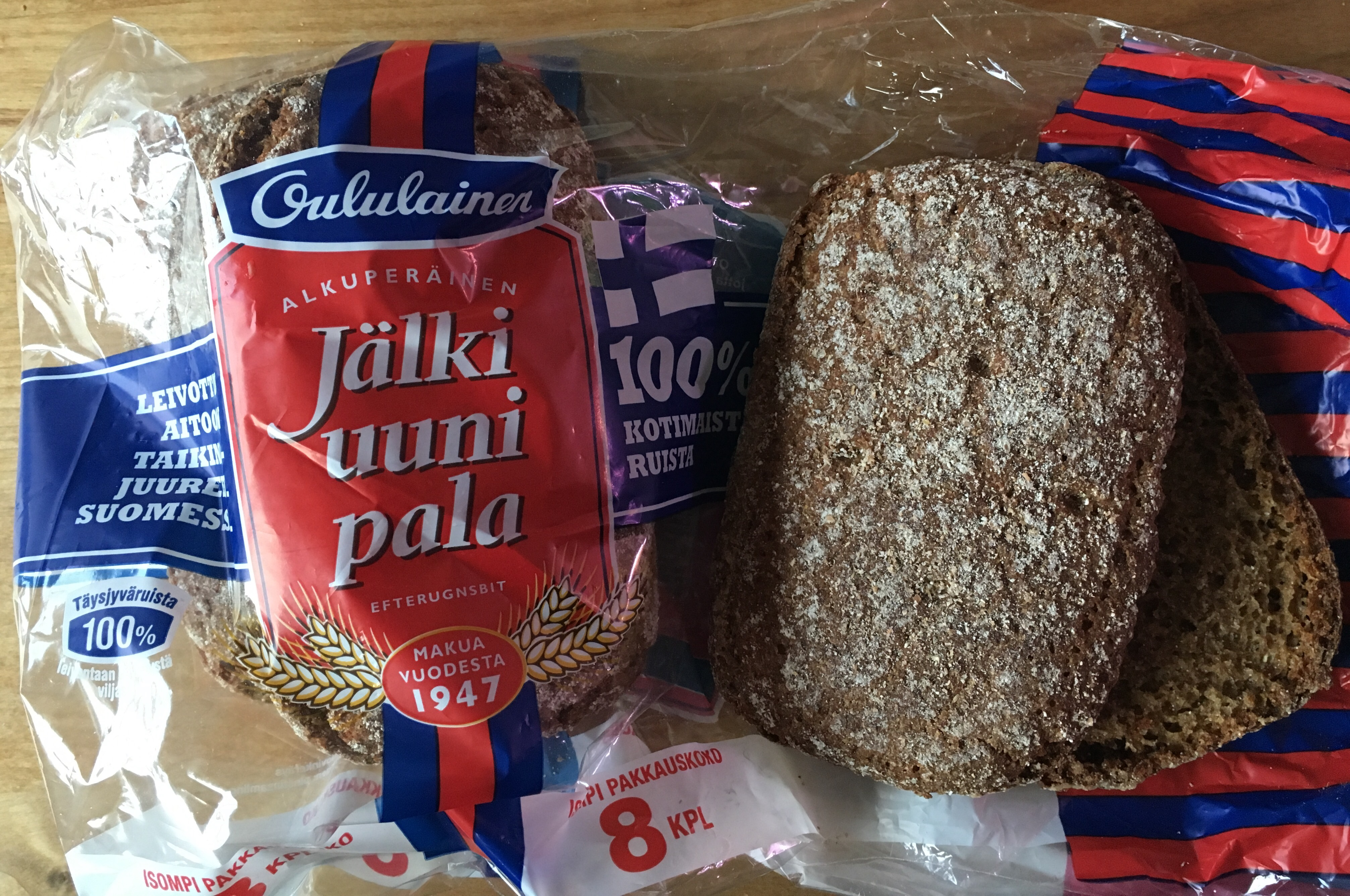 Jälkiuunipaloja oululainen